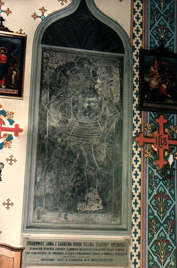 Koło.Kościół farny.Późnogotycka płyta nagrobna Jana z Garbowa h.Sulima, starosty kolskiego, ostatniego syna sławnego rycerza Zawiszy Czarnego, który poległ w bitwie pod Chojnicami na Pomorzu Gdańskim w roku 1454. Grobowiec odnowiony w roku 1894 staraniem regionalisty Michała Rawity-Witanowskiego